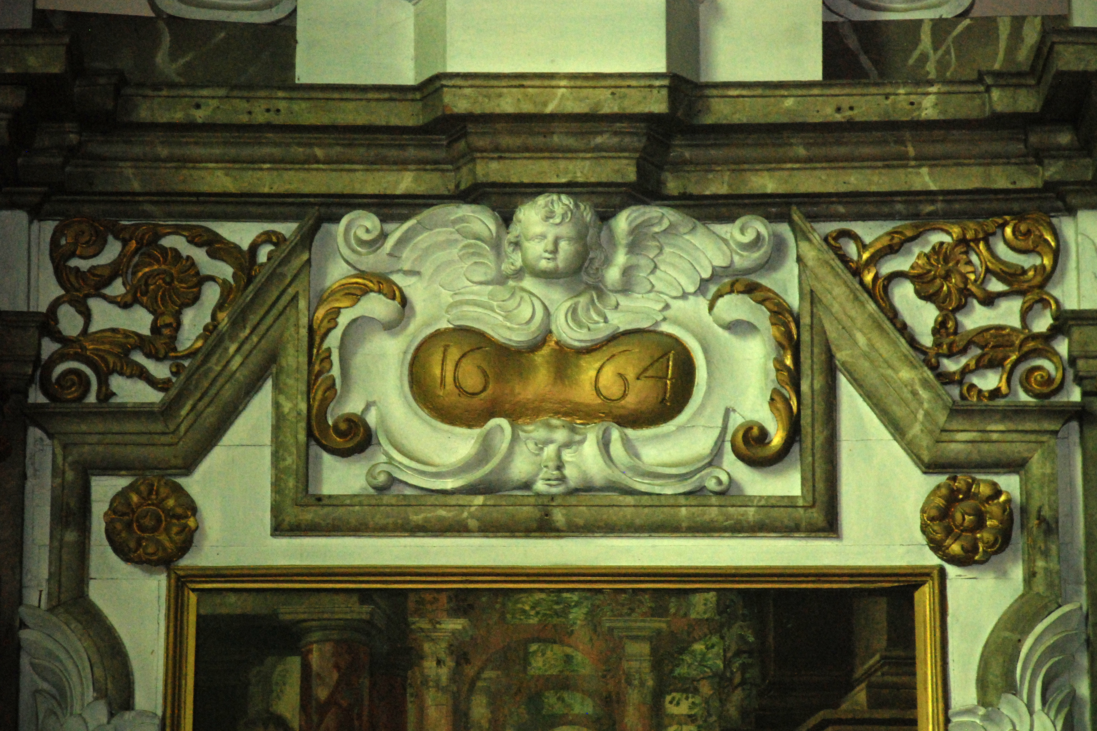 Belgique - Brabant wallon - Église de Court-Saint-Étienne